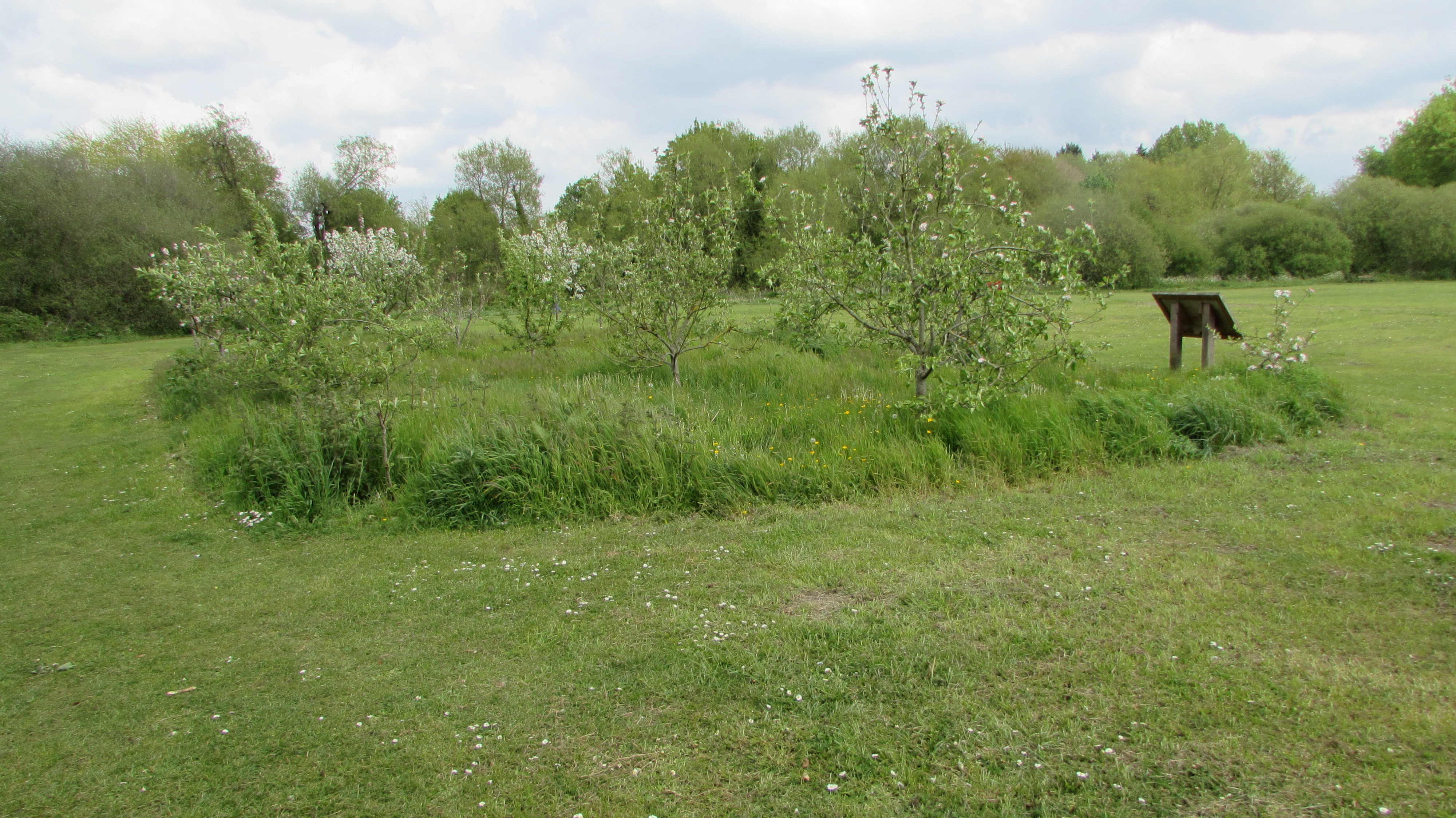 Un huerto comunitario en el campo de recreación de Fisherton.